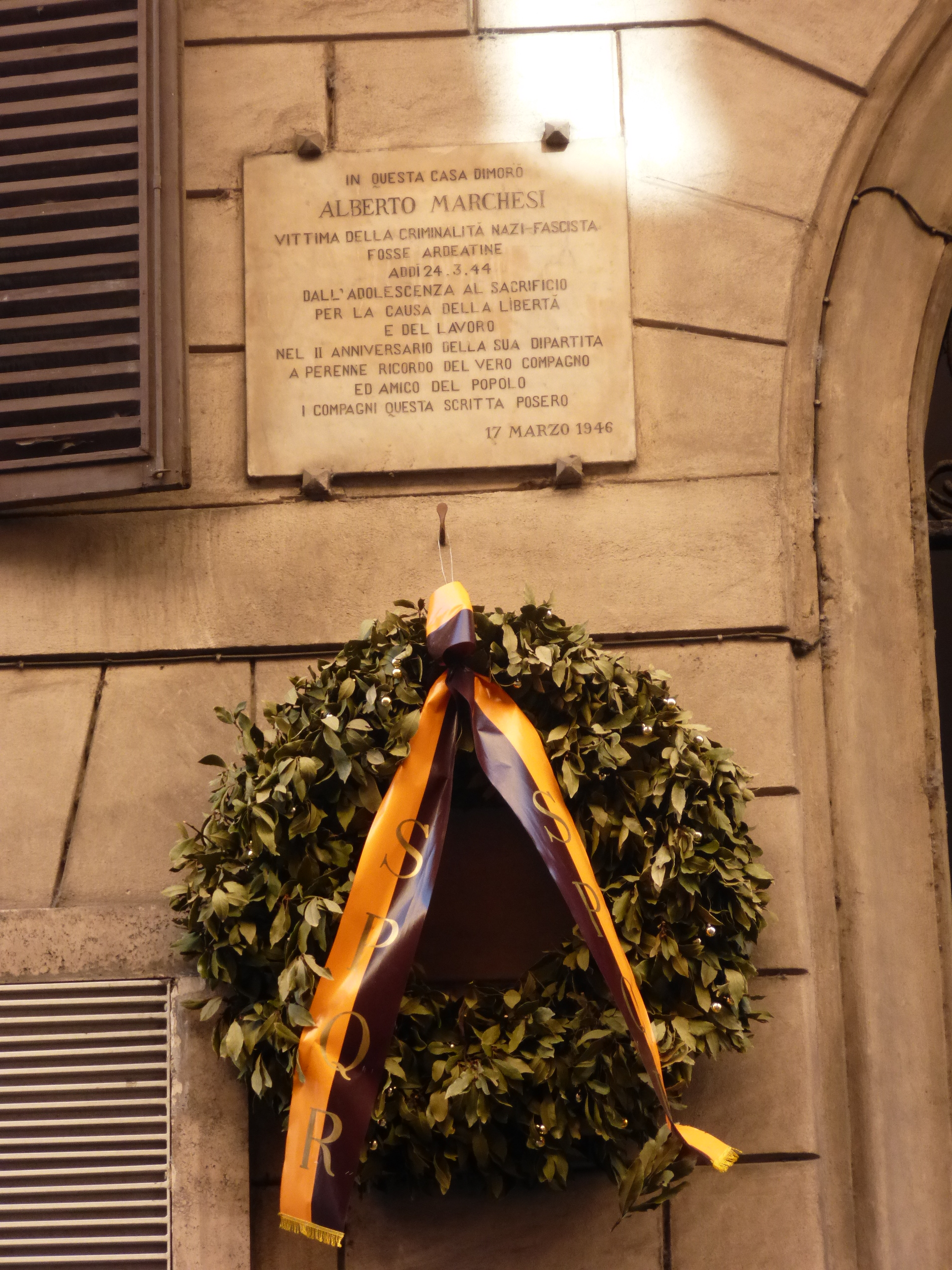 Memoria di Alberto Marchesi, fucilato alle Fosse Ardeatine, sul portone del palazzo Mazio Boncompagni (1855), già sede di Alleanza Nazionale.